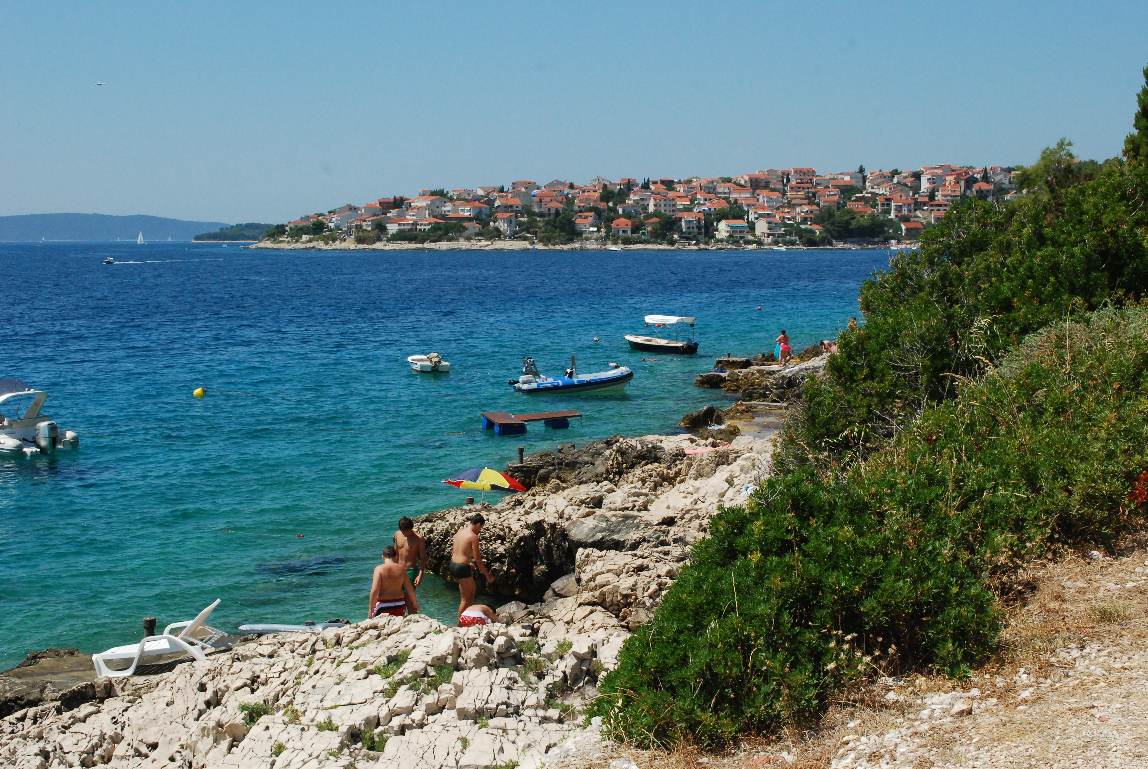 Wyspa Ciovo. Okrug Gornji. Chorwacja